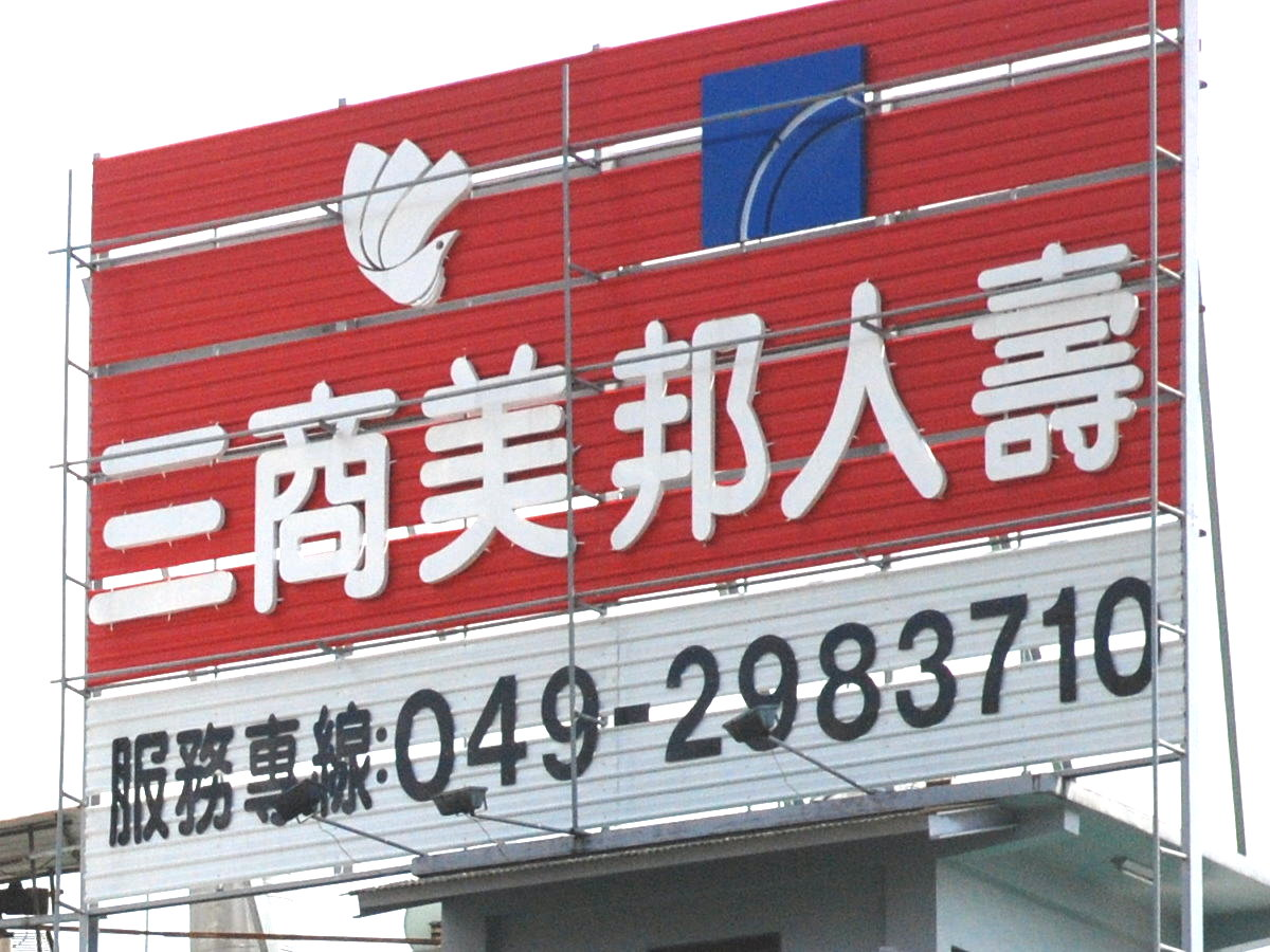 南投縣埔里鎮，三商美邦人壽商標看板。